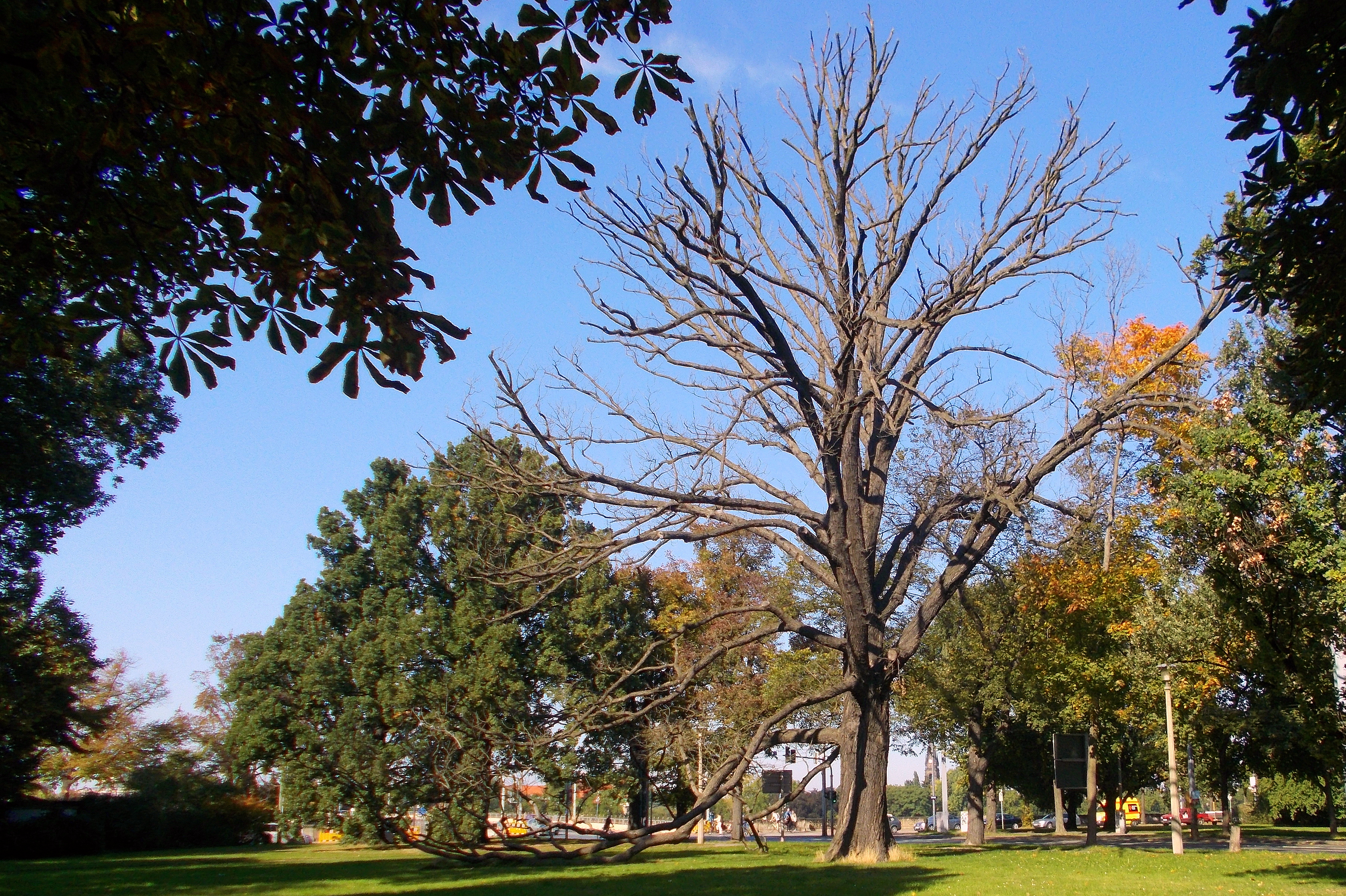 Kahle Eiche (Bur-Eiche/Quercus macrocarpa) im September 2013 auf dem Sachsenplatz in Dresden. Auch die Wuchsform einiger Äste (auf dem Boden) ist beachtenswert.(Der Baum ist 2012/2013 abgestorben, es handelt sich vermutlich um einen Langzeit-Hochwasserfolgeschaden von 2002 – siehe hierzu auch Stellungnahme des Amtes für Stadtgrün und Abfallwirtschaft.) Die Eiche wurde am 25.02.2014 gefällt und soll im Herbst 2014 durch eine Neupflanzung ersetzt werden (Sächsische Neueste Nachrichten vom 26.02.2014 - Seite 13)